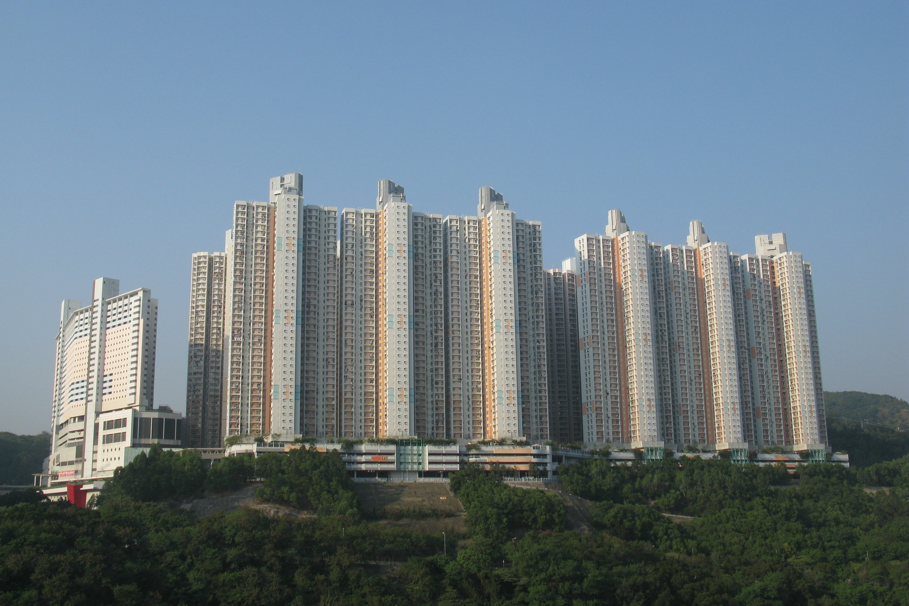 秀茂坪-寶達邨 Po Tat Estate, Sau Mau Ping